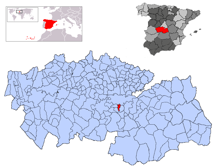 Cobisa en la provincia de Toledo